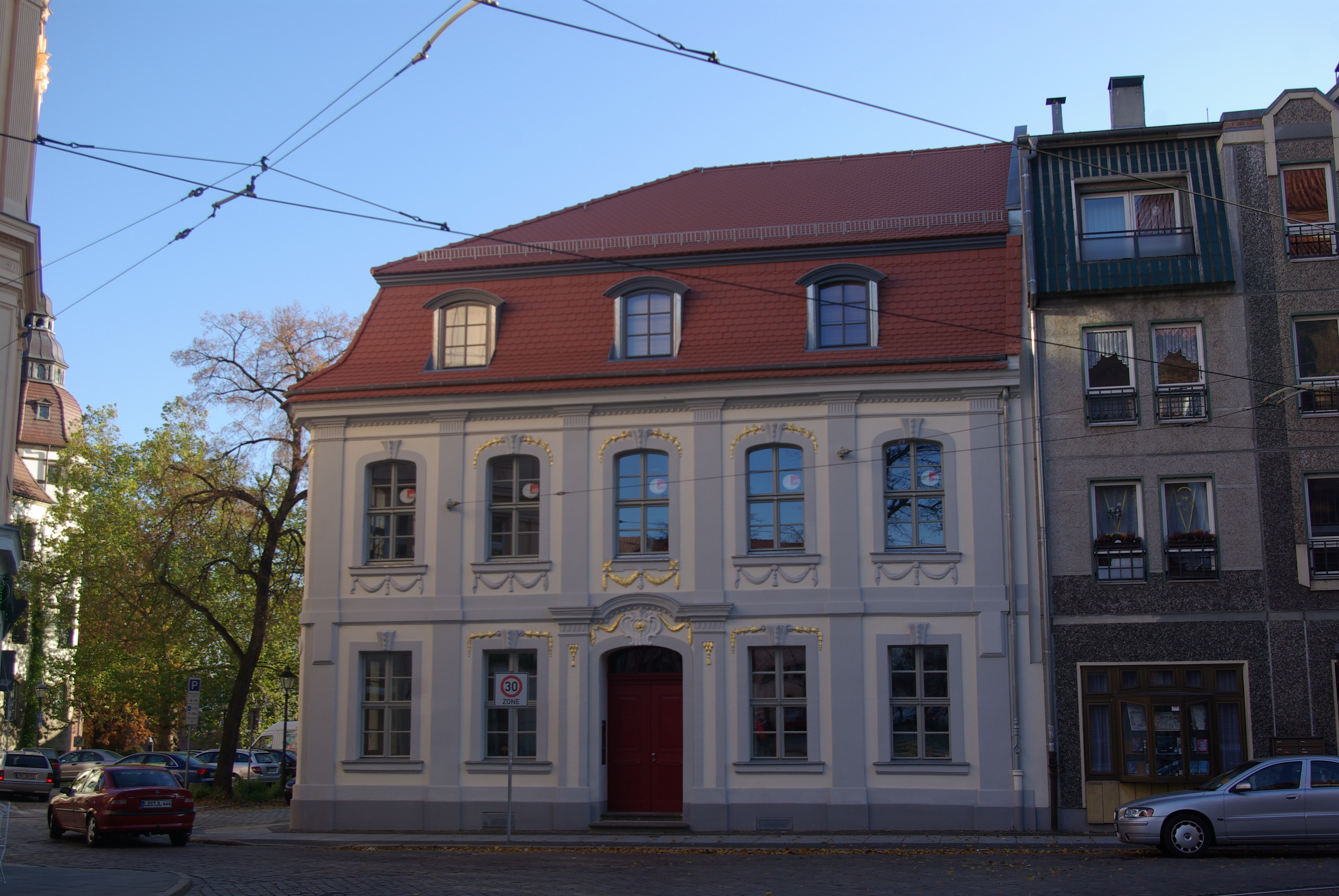 Cottbus in Brandenburg. Das Haus in der Sandower Straße 50 steht unter Denkmalschutz.